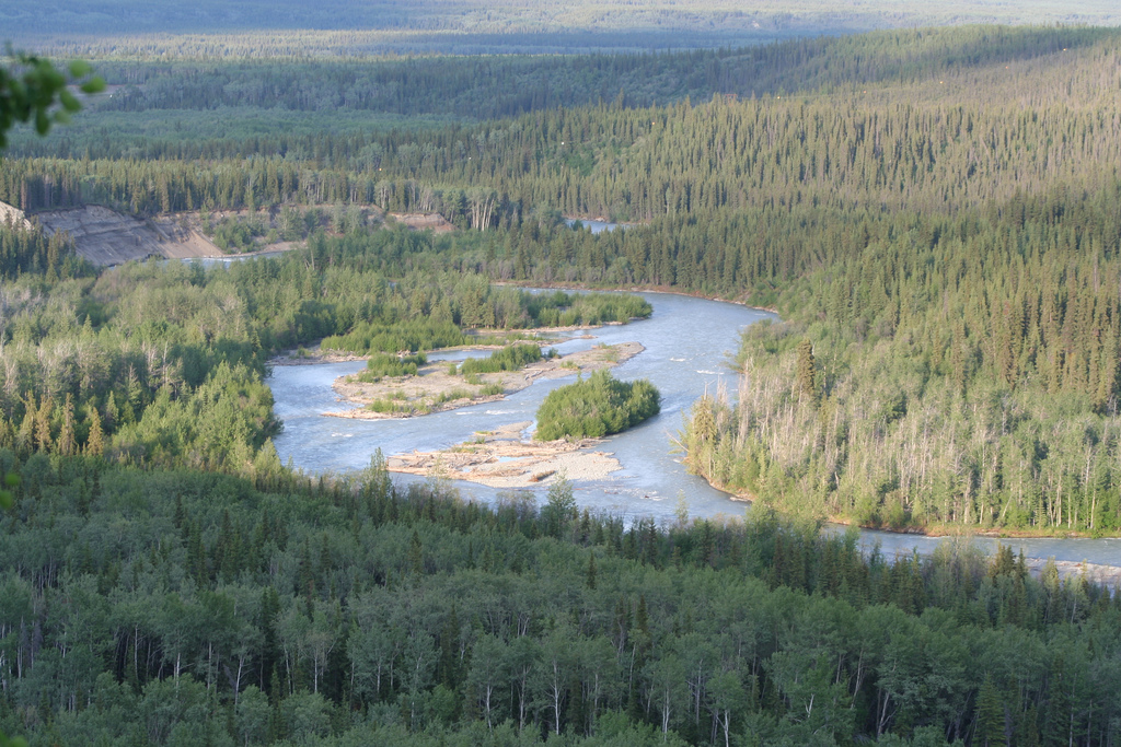 Klutina River